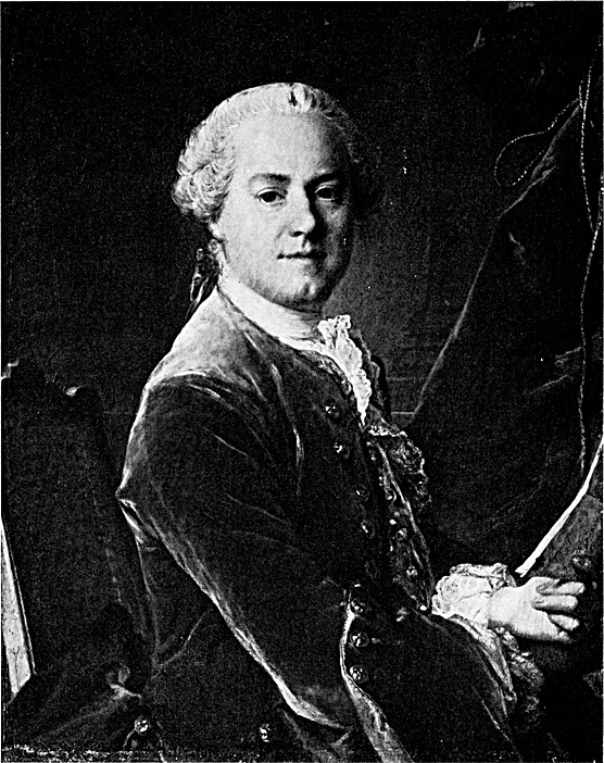 Portrait of Joachim Wasserschlebe